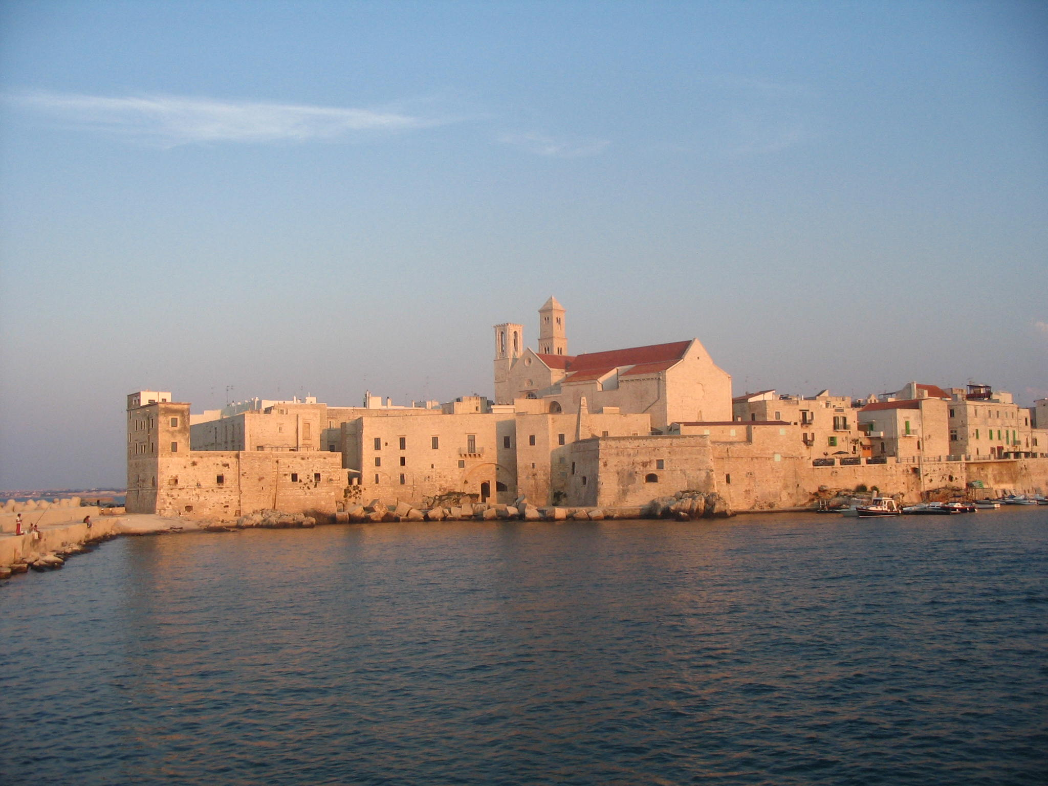 Giovinazzo, Puglia, Italia. Al centro la cattedrale di S. Maria AssuntaIMG_4808